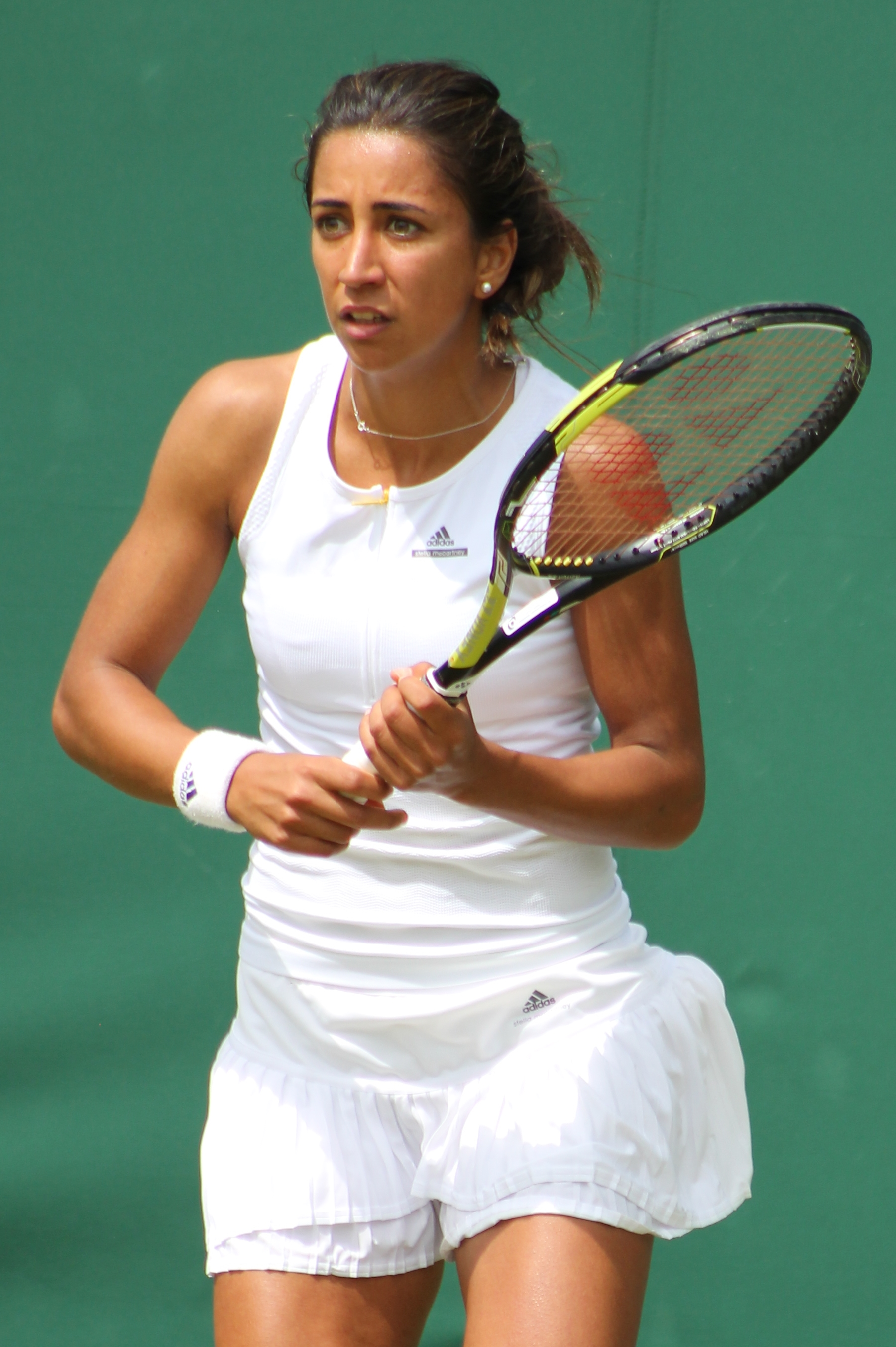 Buyukakcay WMQ15 (3)